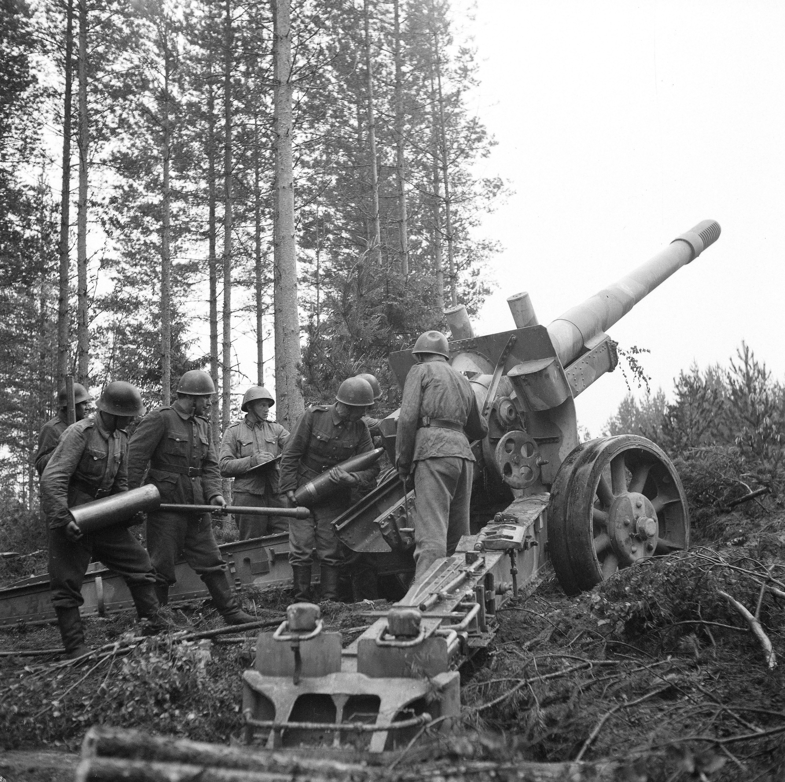 152-мм финское орудие ведет огонь, июнь 1944 г.